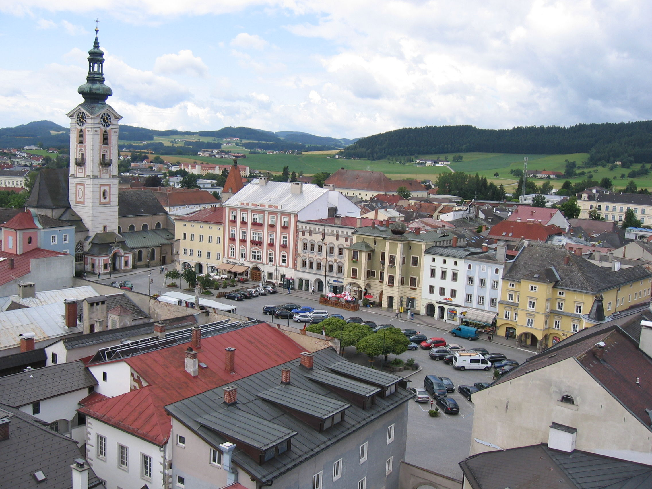 Ausblick vom Bergfried zum Hauptplatz